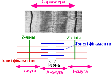 Будова саркомер поперечно-смугастих м'язів